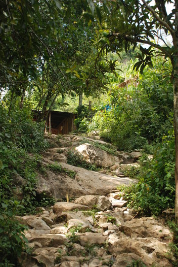 Hermoso paisaje